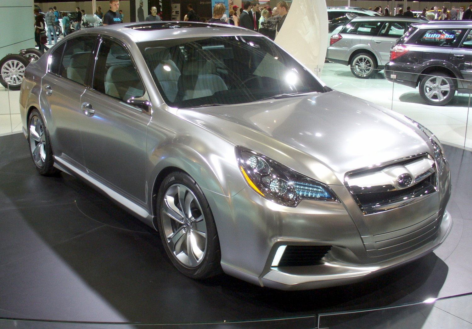 Subaru Legacy Concept